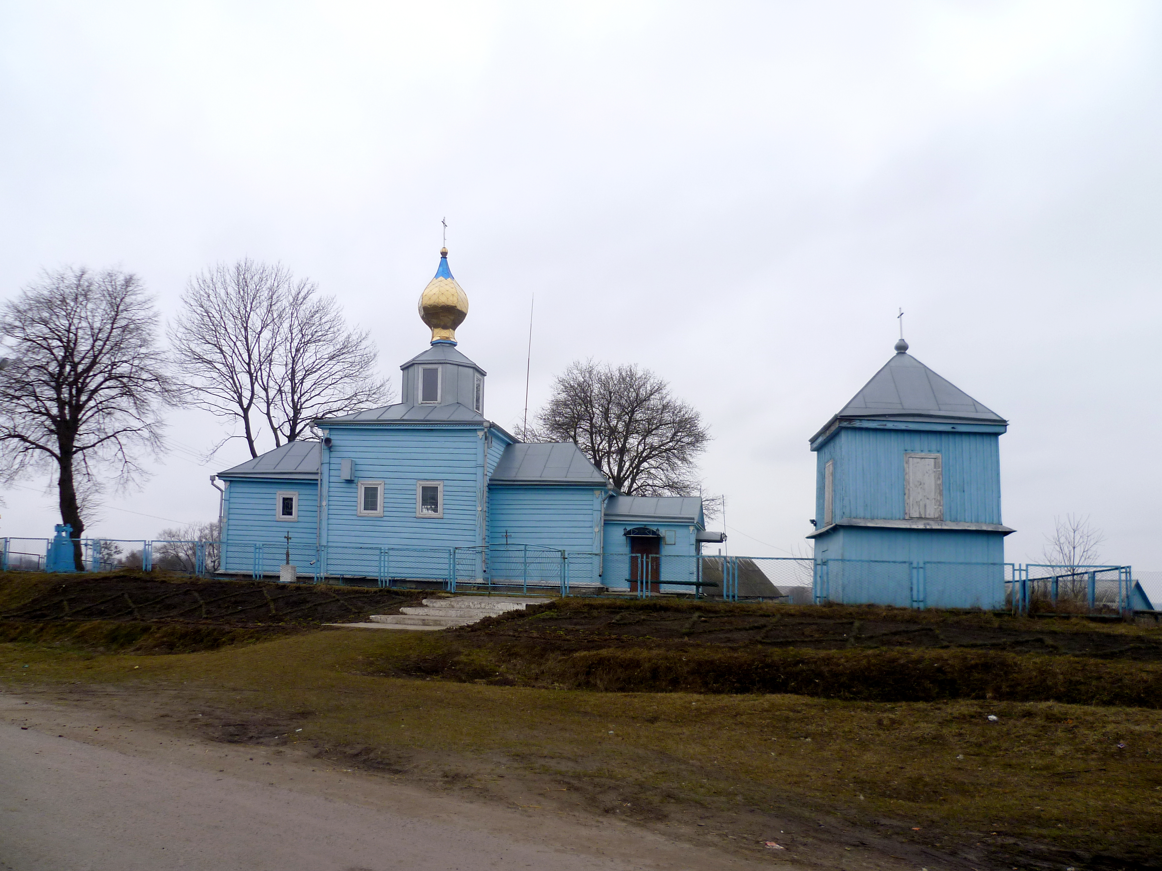 Миколаївська церква (дер.) (1743 рік) – загальний вигляд з дзвіницею – с.Смолигів Луцький район Волинська область Україна